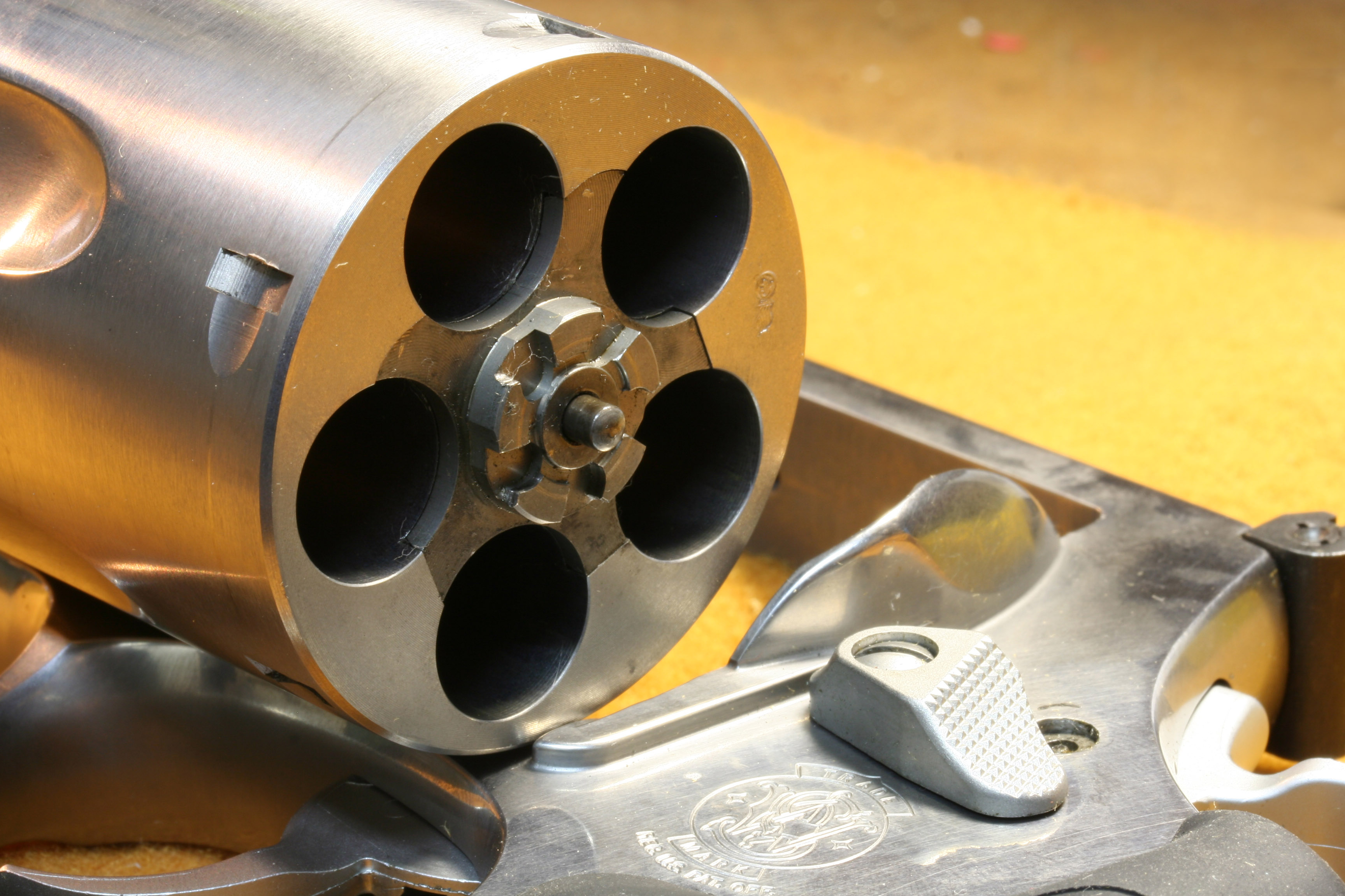 S&W500 Trommel